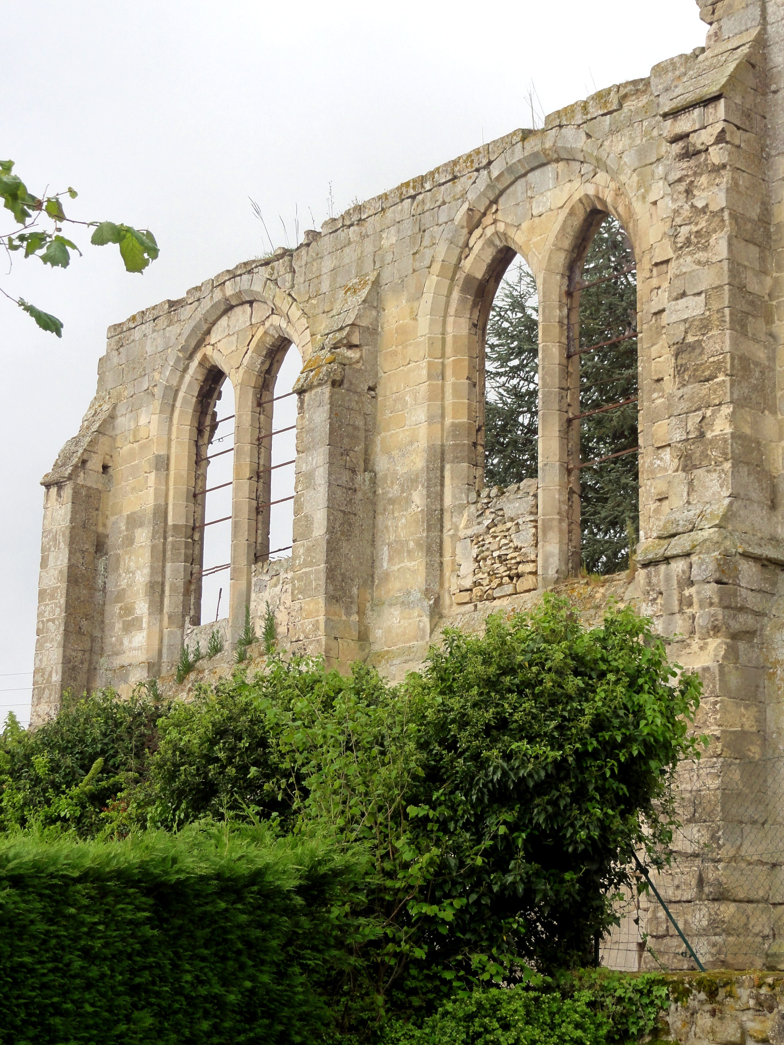 Grande chapelle, chevet.